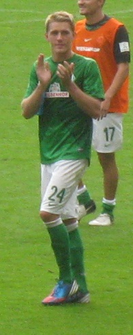 Nils Petersen als Spieler für Werder Bremen in der Saison 2012/13.